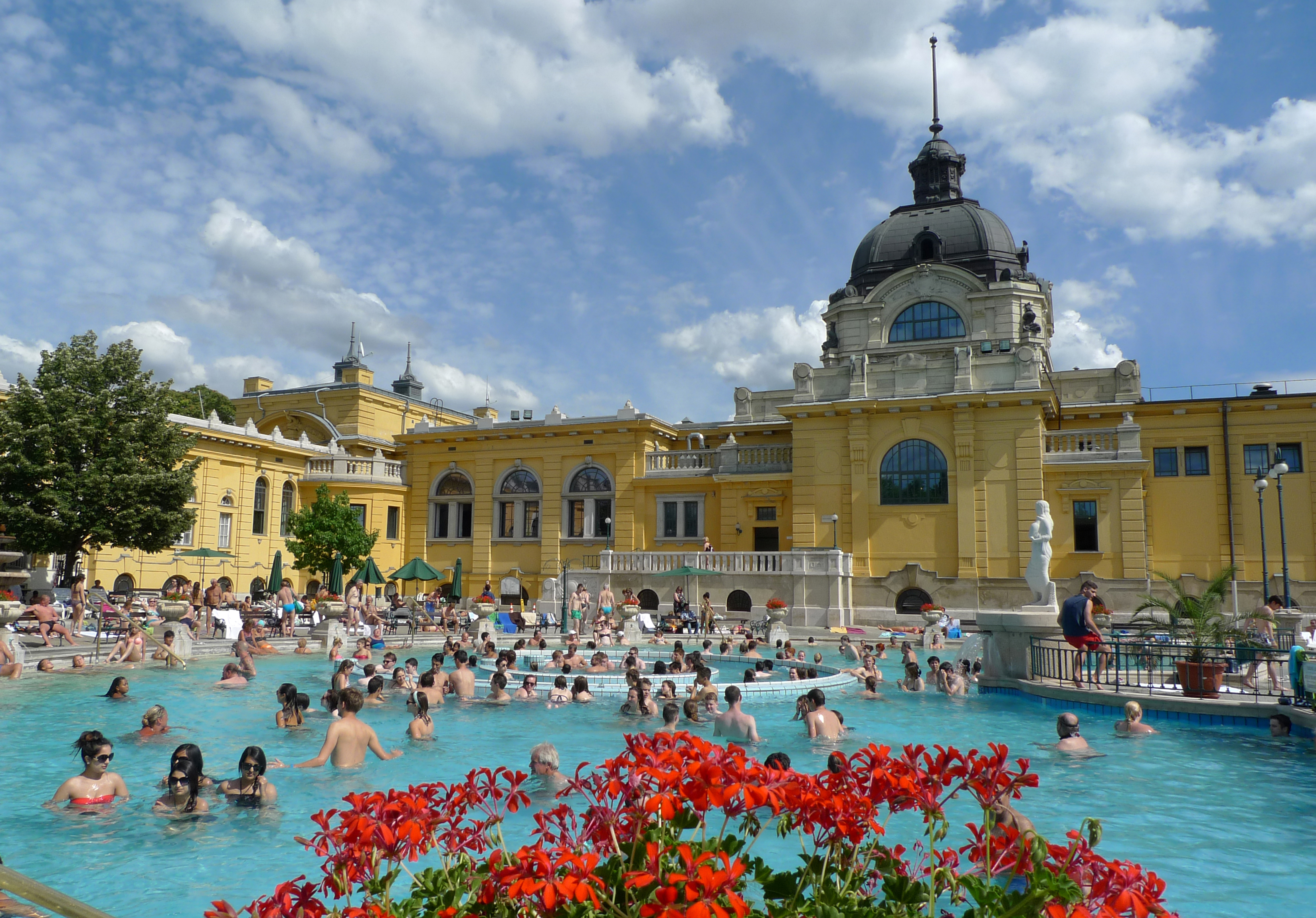 Lázně Szechenyi v Budapešti - venkovní bazén